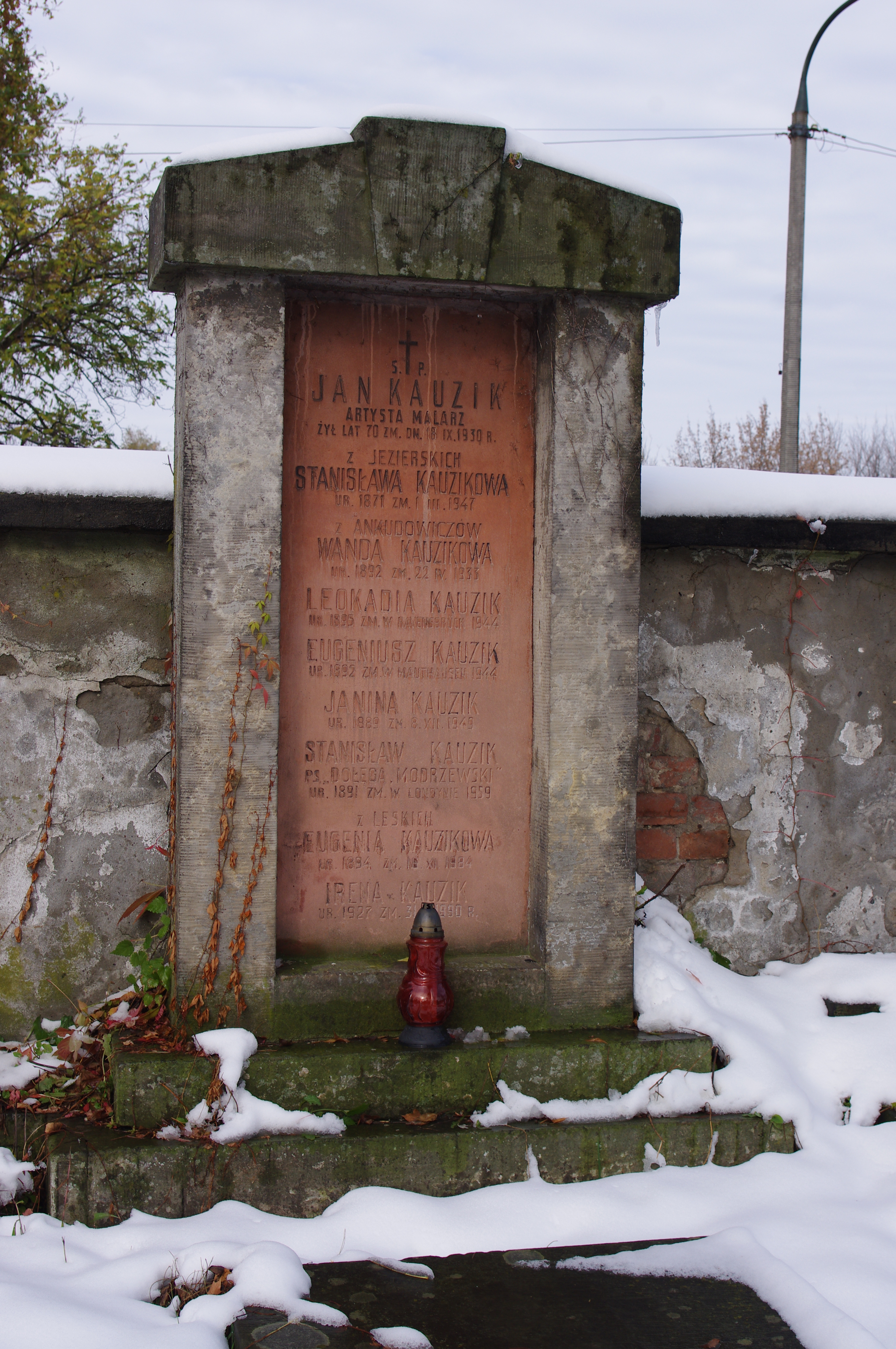 Grób malarza Jana Kauzika na Starych Powązkach w Warszawie